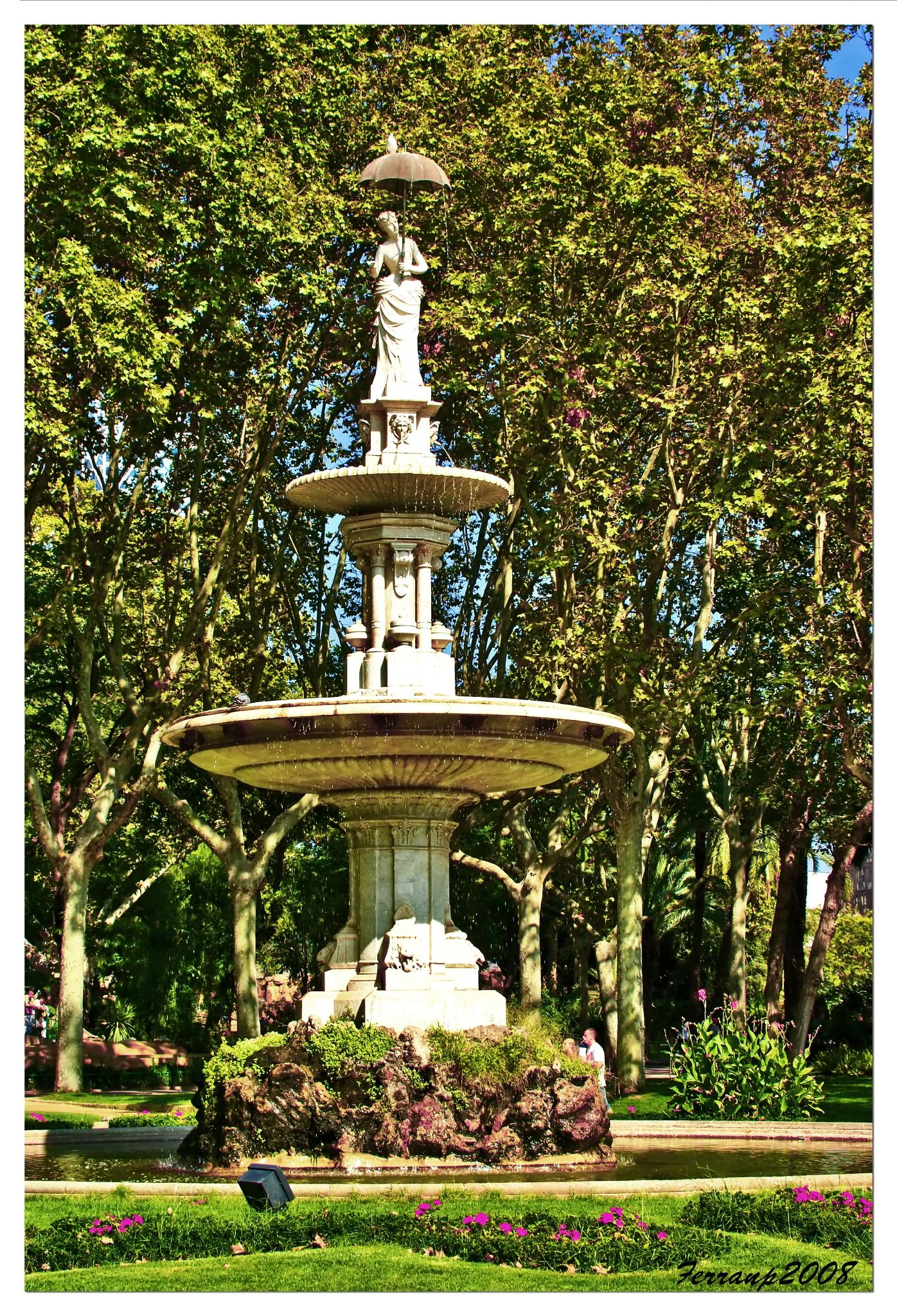 Font de la Dama del Paraigua (Barcelona)